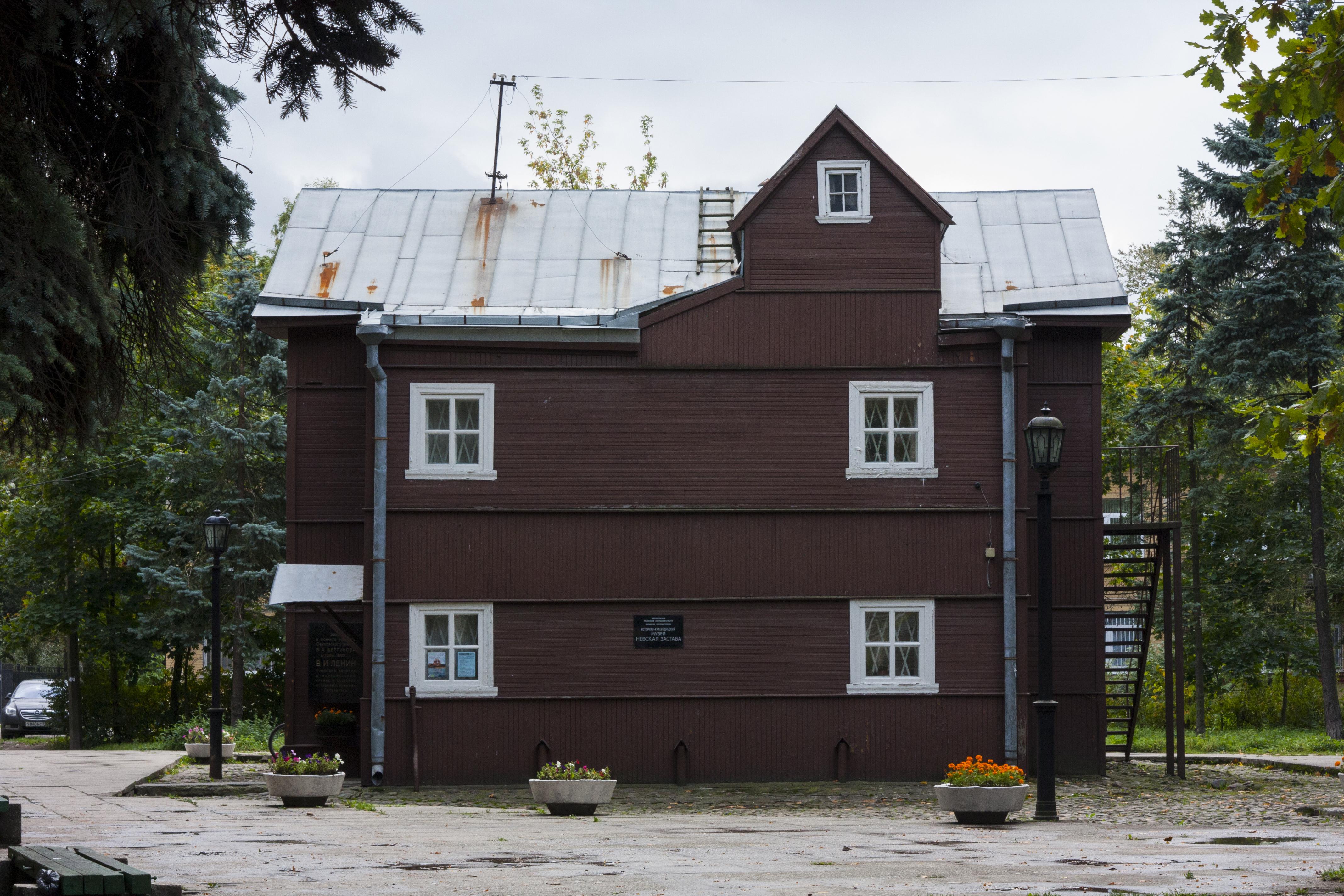 Дом, в котором Ленин руководил марксистским кружком: улица Ново-Александровская 23 A, Санкт-Петербург, Невский район, Санкт-Петербург